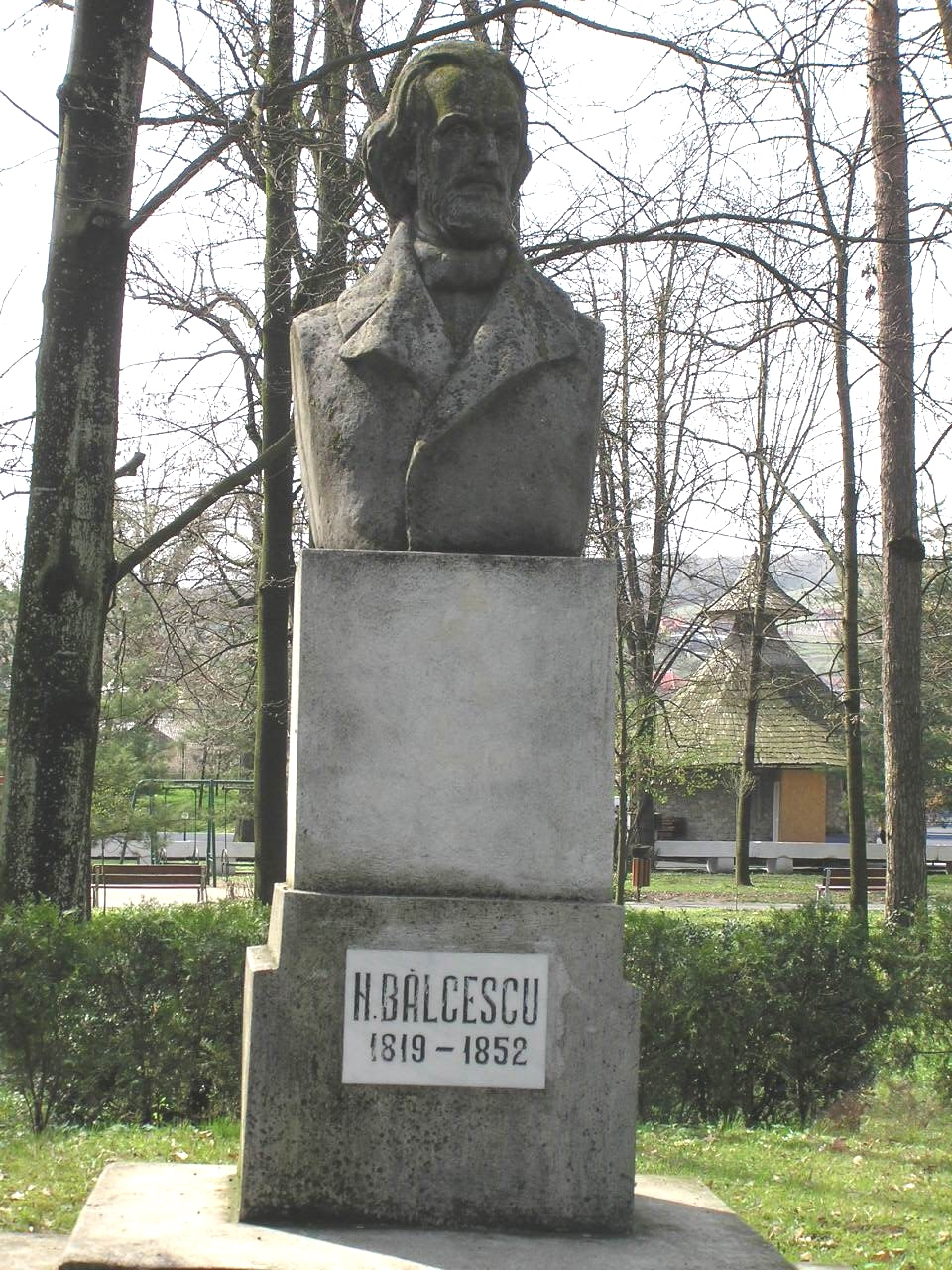 Büste von Nicolae Bălcescu im Stadtpark „Zăvoi“ von Râmnicu Vâlcea, Rumänien.